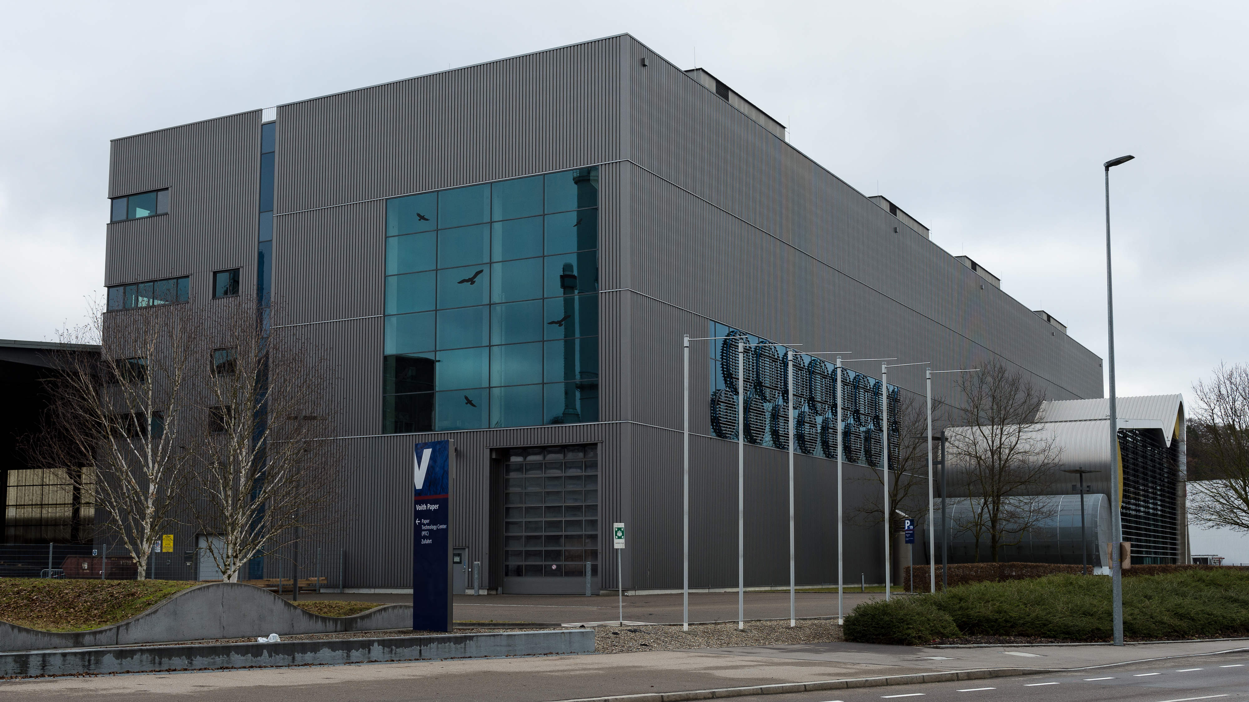 Das Voith Paper Technology Center an der Paul-Hartmann-Straße in Heidenheim an der Brenz.